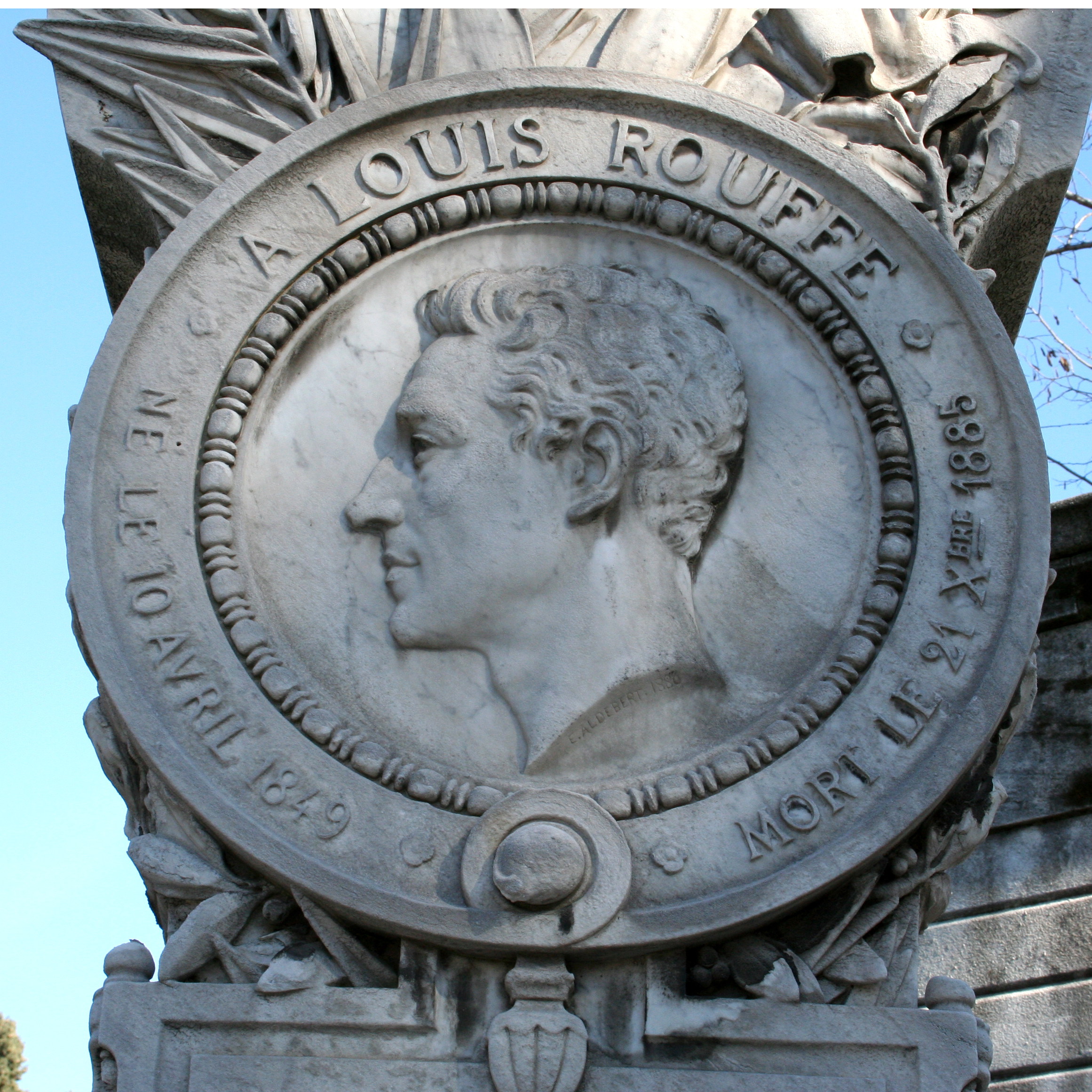 Médaillon sculpté par Aldebert représentant le pantomime Louis Rouffe, père de l'actrice Alida Rouffe rendue célèbre dans les pièces de Pagnol. Tombe de la famille au cimetière Saint-Pierre à Marseille.